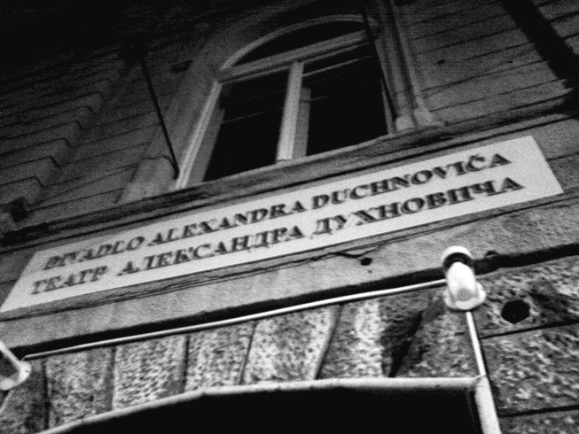 priecelie budovy divadla alexandra duchnovica v presove. Licensing